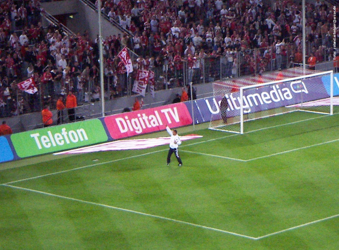 Abschied von Lukas Podolski von den Fans des 1. FC Köln am 31. Juli 2007 im Kölner Rheinenergie-Stadion (nach dem Freundschaftsspiel 1. FC Köln gegen Bayern-München)